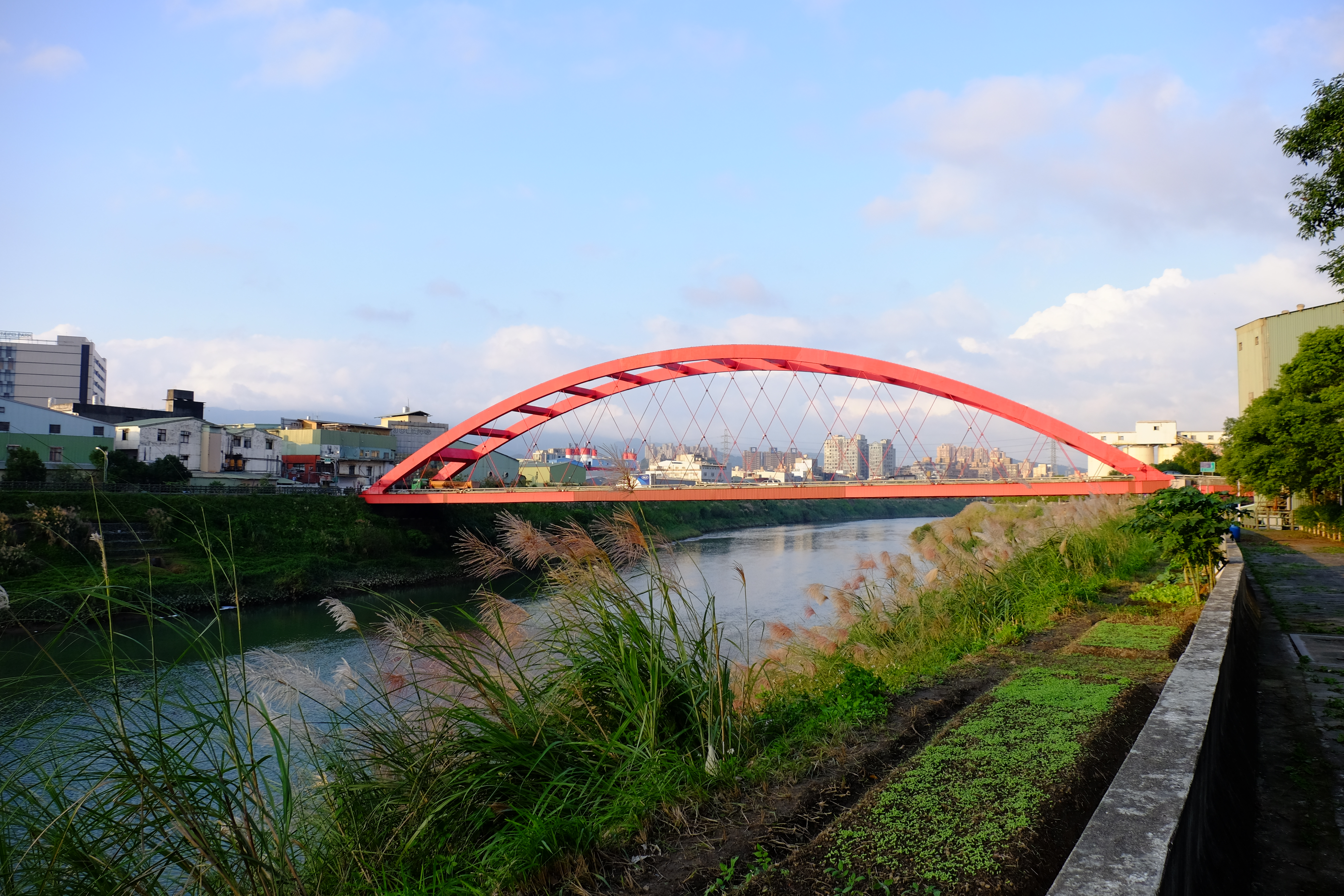 中文（台灣）: 從基隆河東岸西北望南陽大橋南側。